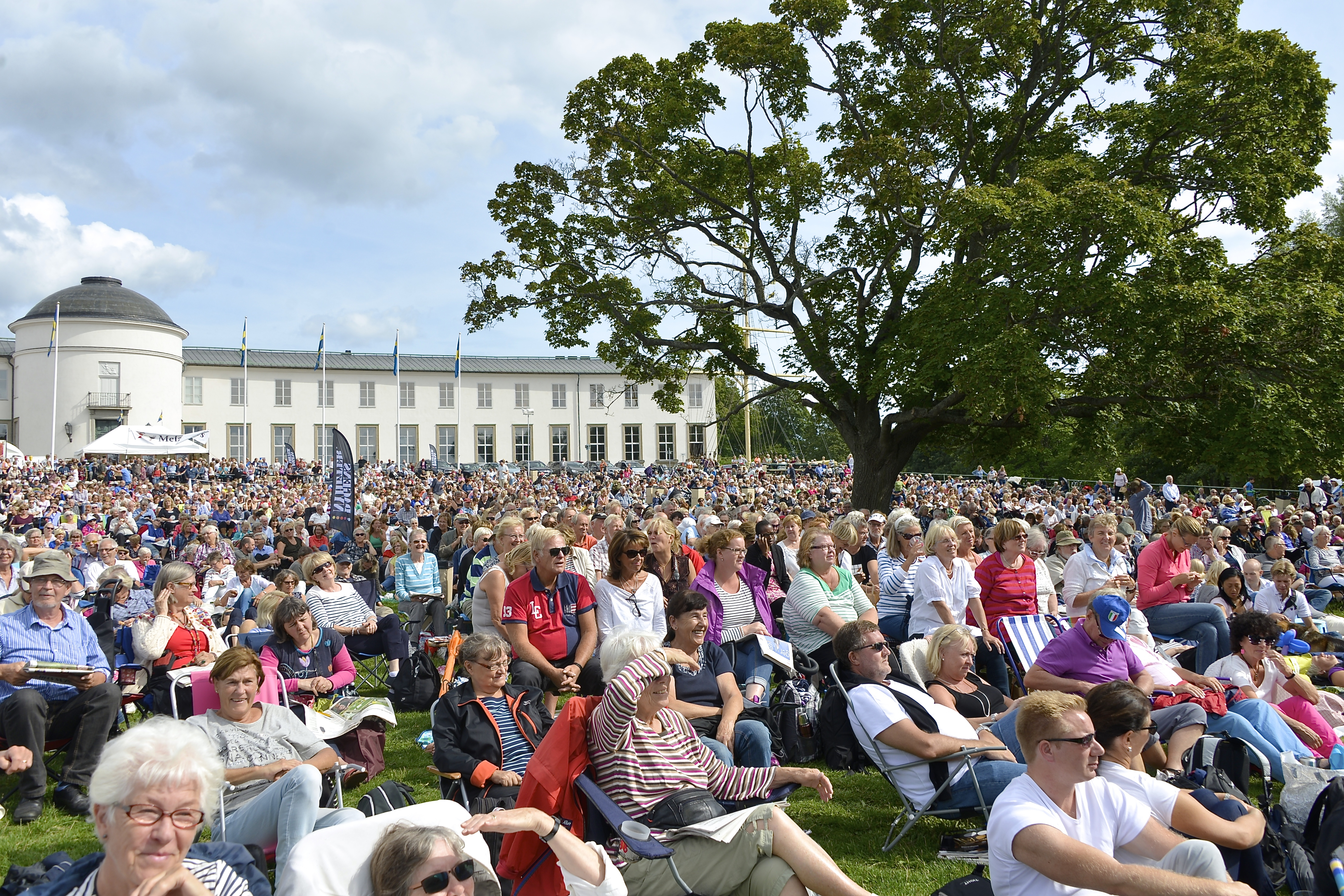 DN-konserten med Kungliga Filharmonikerna på Gärdet vid Sjöhistoriska museet den 17 augusti 2014. Årets solist är sångerskan Lisa Nilsson. Värd är konserthuschef Stefan Forsberg. Dirigent är David Björkman.